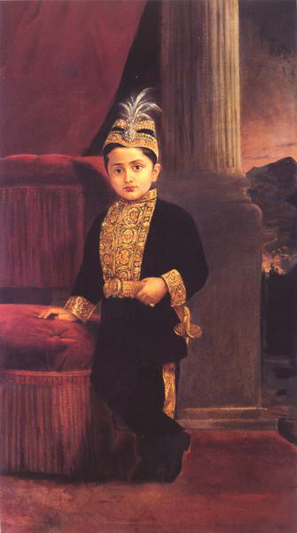 Raja_Ravi Varma Painting maharaja fatehsingh rao Gaekwad